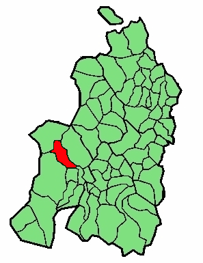 aipaturiko udalerriaren kokapena Nafarroa Beherean